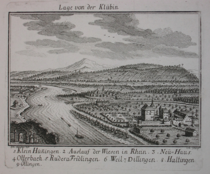 Lage von Schloss Klybeck, aus dem Werk: Die Merkwürdigkeiten der Landschaft Basel, im VI. Stück.